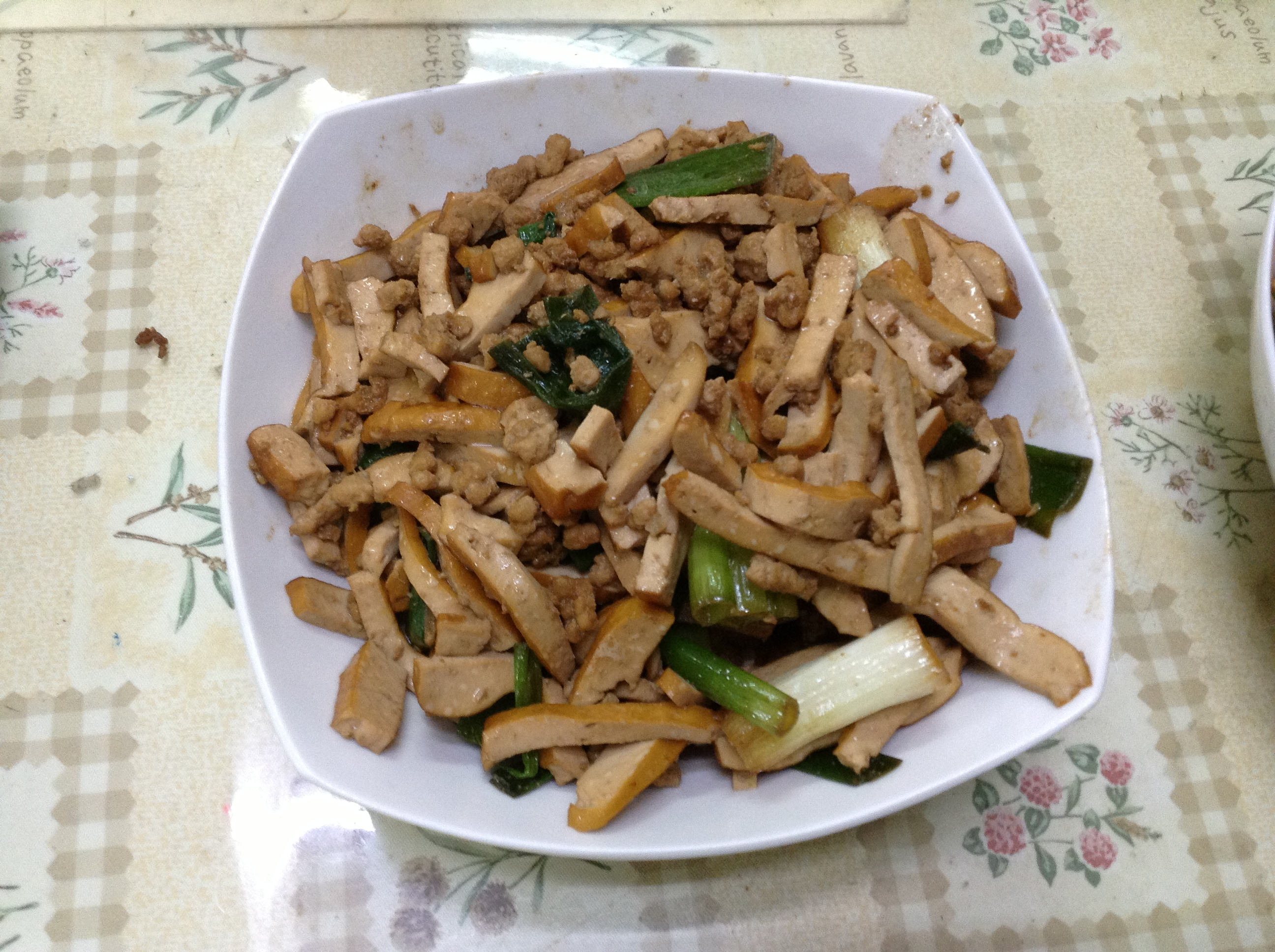 六年制學程吃飯說菜